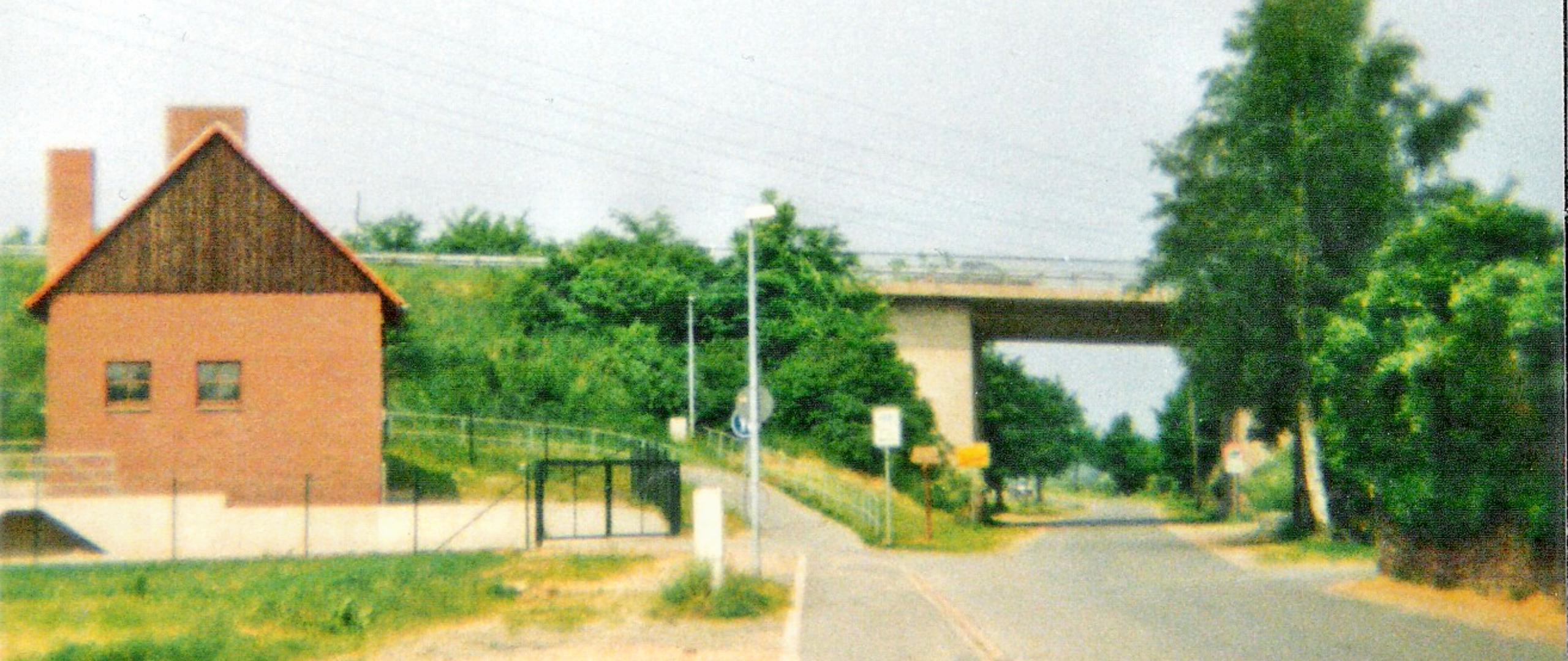 Lange Straße bis zur Unterführung Weserbrücke und links das 1987 erbaute Pumpwerkgebäude in Höxter-Lüchtringen 1991.